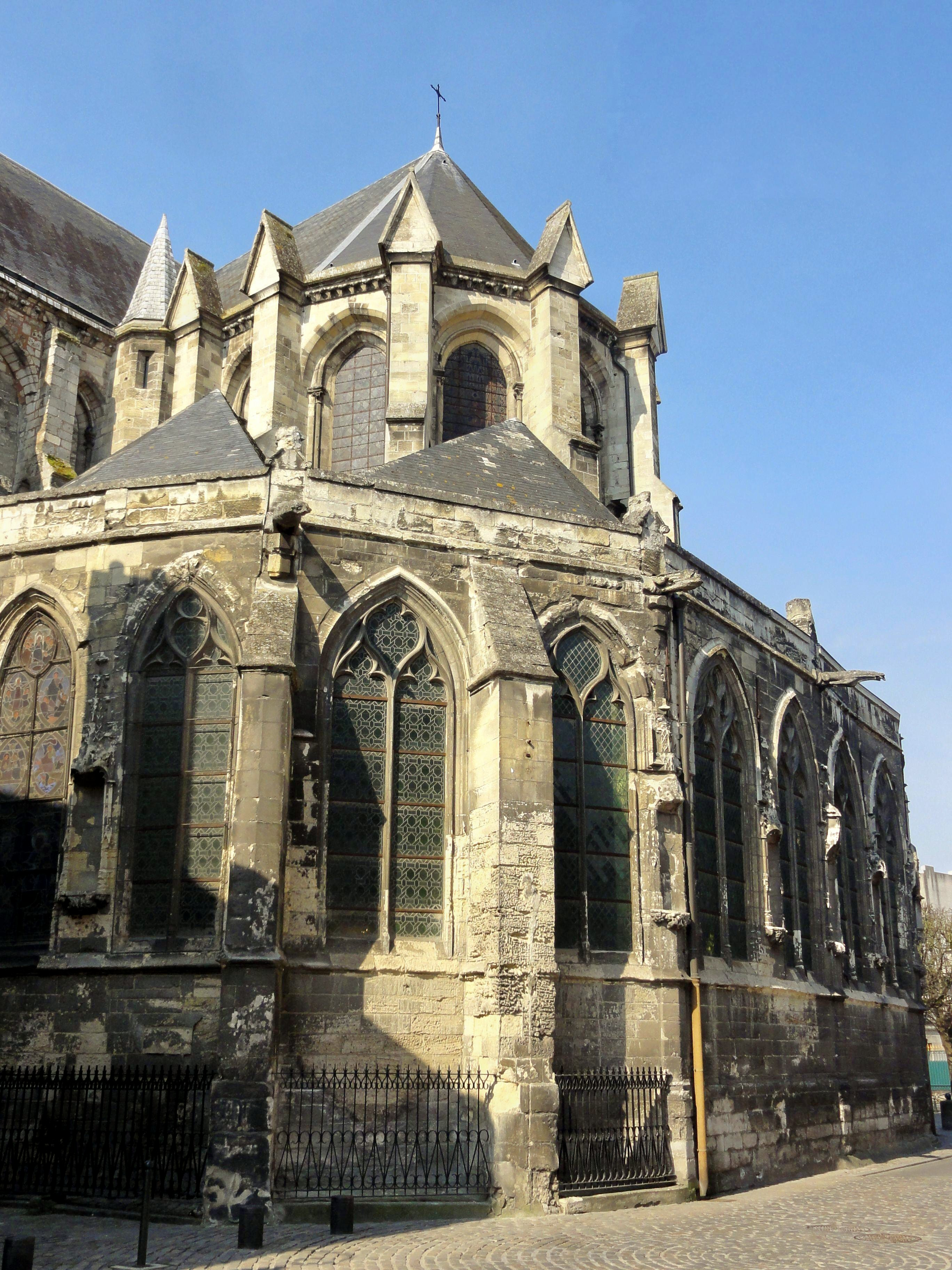 Chevet, côté sud-est.